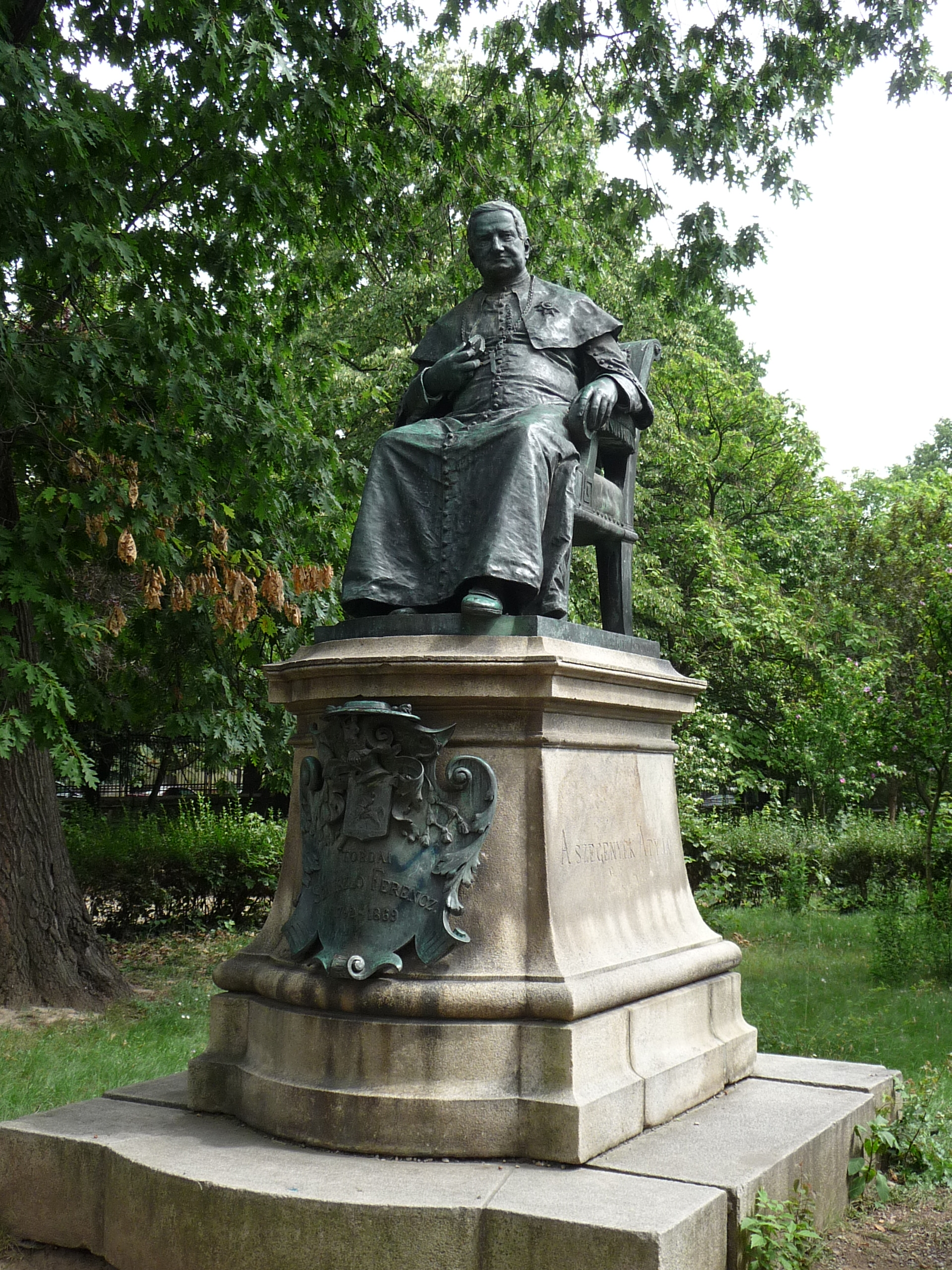 Szaniszló Ferenc (püspök) szobra (Tóth István, 1896) a nagyváradi püspöki palota kertjében, a Szent László szoborral szemben áll. - Románia, Nagyvárad (Oradea), Kanonok sor (Sirul Canonicilor)